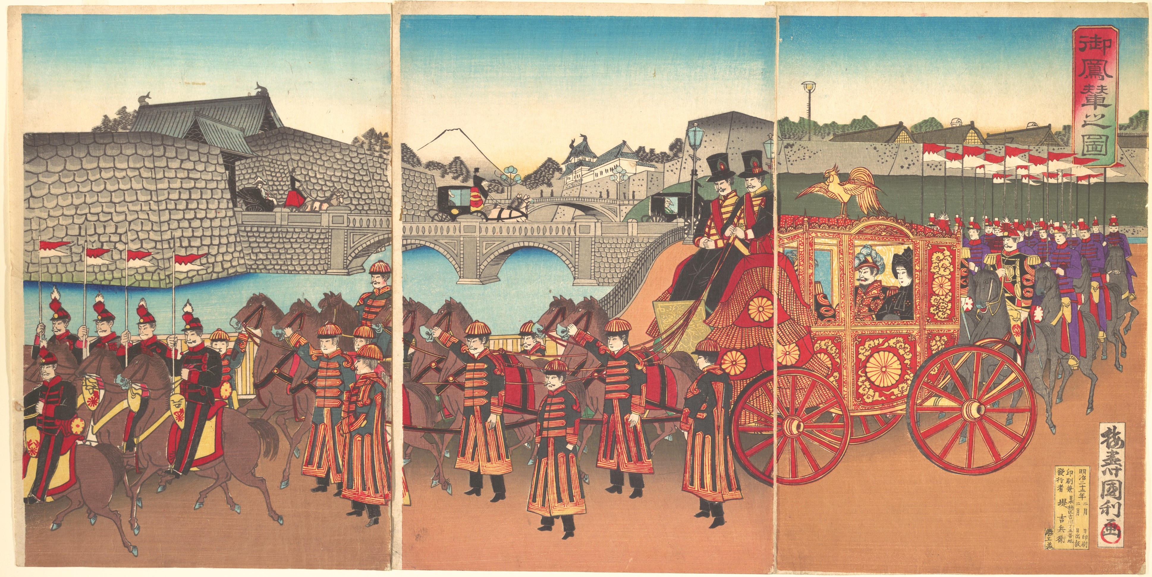 Japan; Print; Prints